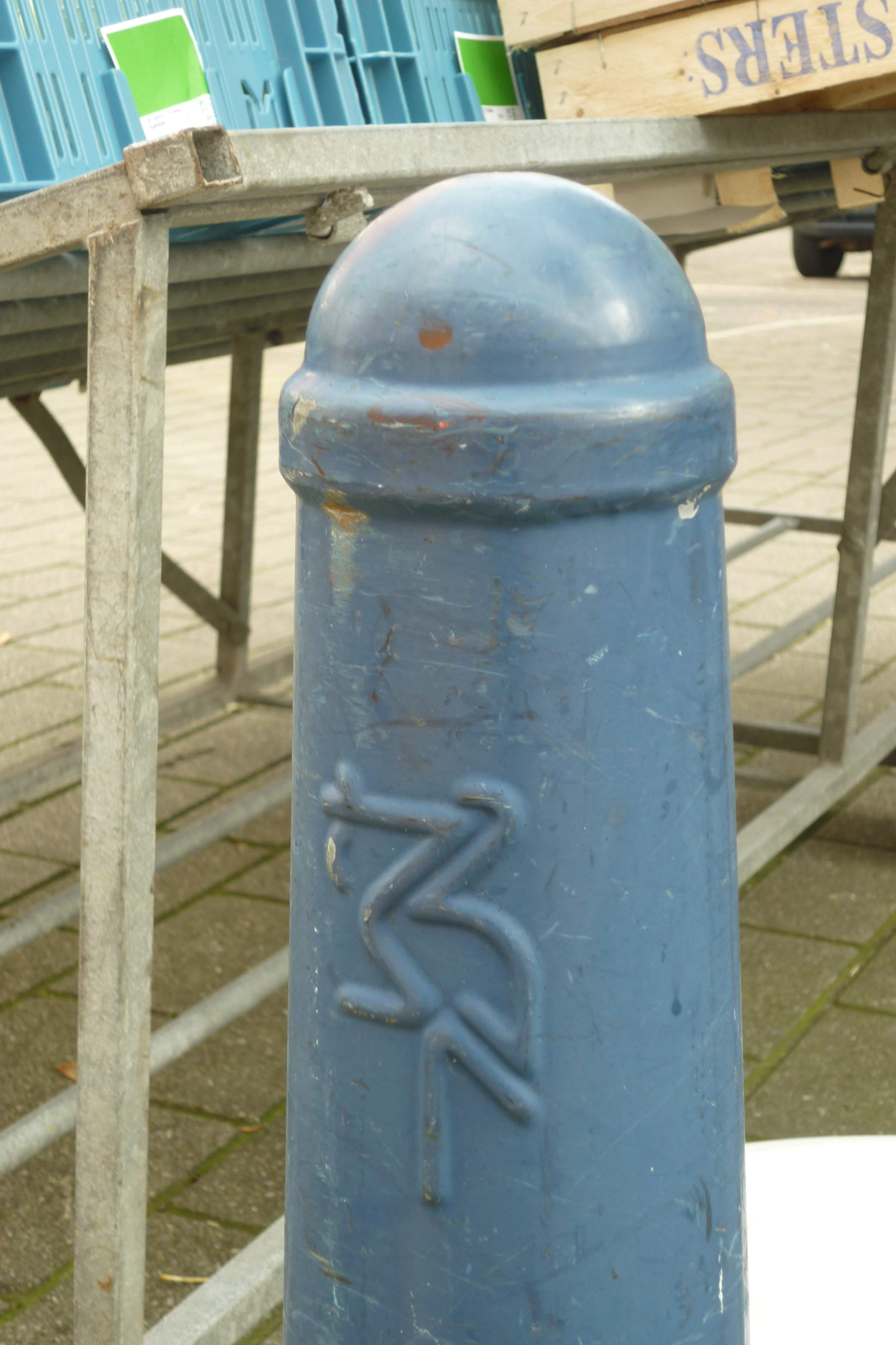 Hagenaar in de Piet Heinstraat